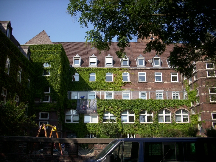 Nikolausburg in Duisburg-Ruhrort